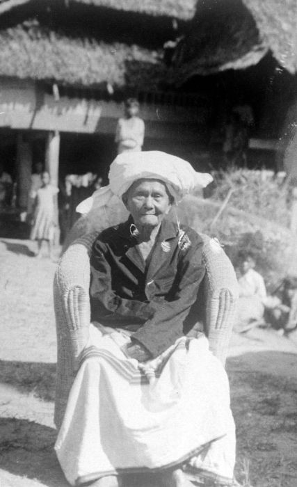 Repronegatief. De bewoners van Midden-Celebes, vooral de 'romp' van het eiland dat verder vier 'armen' heeft, en een deel van Zuid-Celebes werden in de koloniale periode doorgaans met de term Toradja's aangeduid. Dat gebeurt ook nu nog wel, maar meestal onderscheidt men tegenwoordig kleinere etnische eenheden, een proces dat men ook met betrekking tot de Dajaks van Borneo kan waarnemen. In 1930 woonden er in Midden-Celebes 10 à 20 mensen per vierkante kilometer terwijl er toen in de Afdeling Makassar 130 mensen per vierkante kilometer woonden. De Toradja's waren rond 1900 over het algemeen 'heidens'. Hun contacten met de buitenwereld waren beperkt. Diverse Toradja groepen kenden zowel adel als slavernij. (P. Boomgaard, 2001). Oud Torajahoofd te Kajoéberang, Celebes